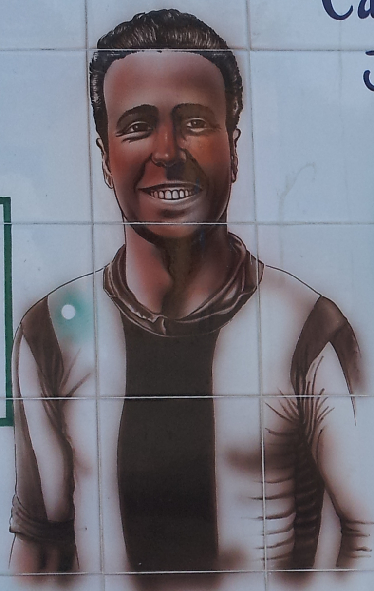 Vicent Martínez Català, tal com apareix a la placa de l'estadi que duu el seu nom, a Manises.